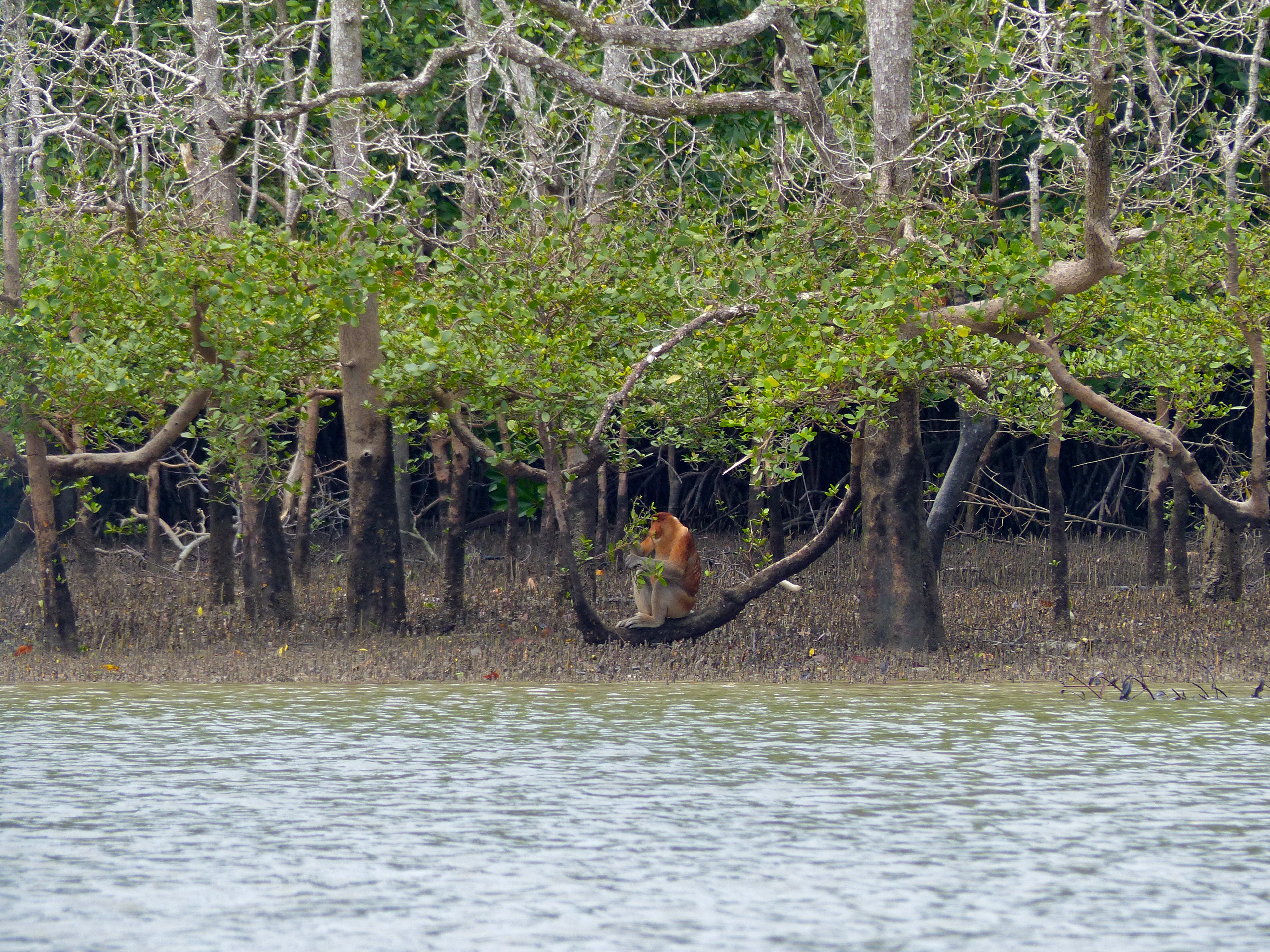 Batang Salak Estuary North of Kuching, Sarawak, MALAYSIA